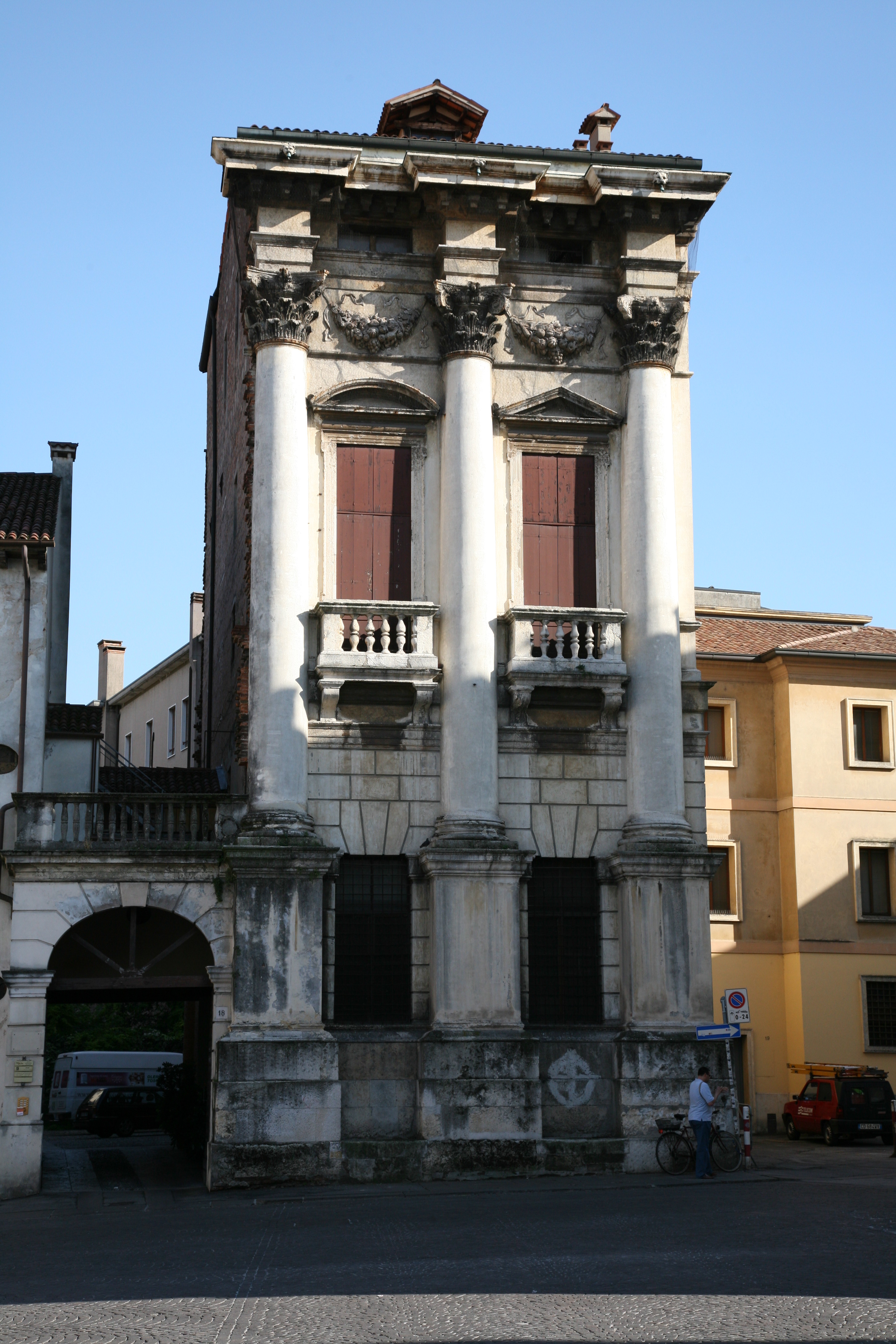 Palazzo Porto in piazza Castello (Vicenza) is a partially built palace by Andrea Palladio.